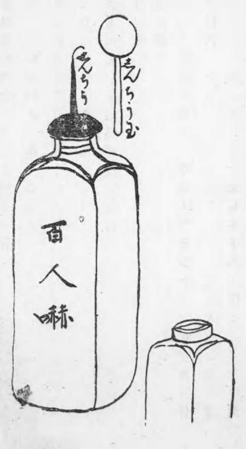 百人怯えのライデン瓶